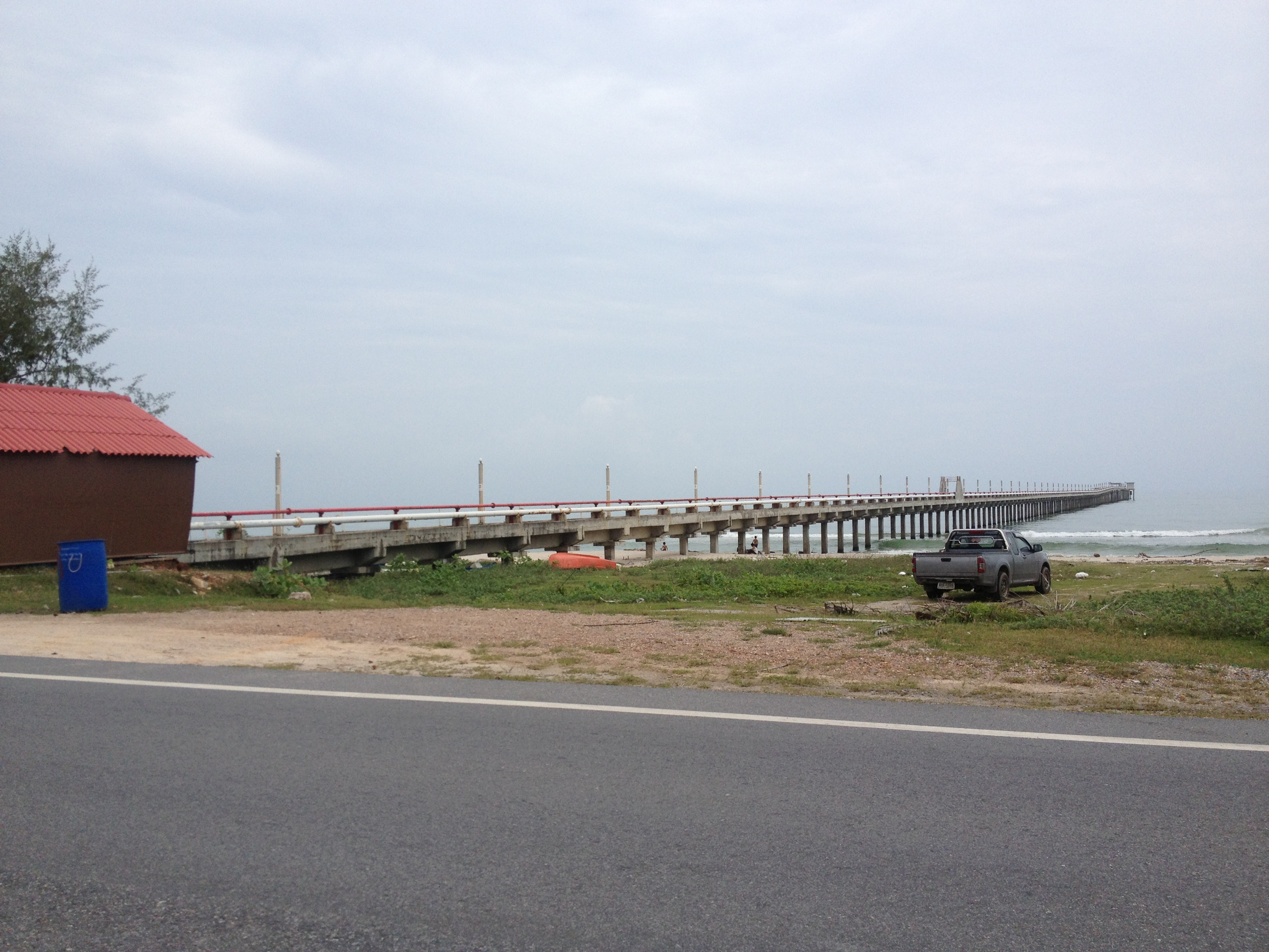 Khao Rup Chang, Mueang Songkhla District, Songkhla 90000, Thailand